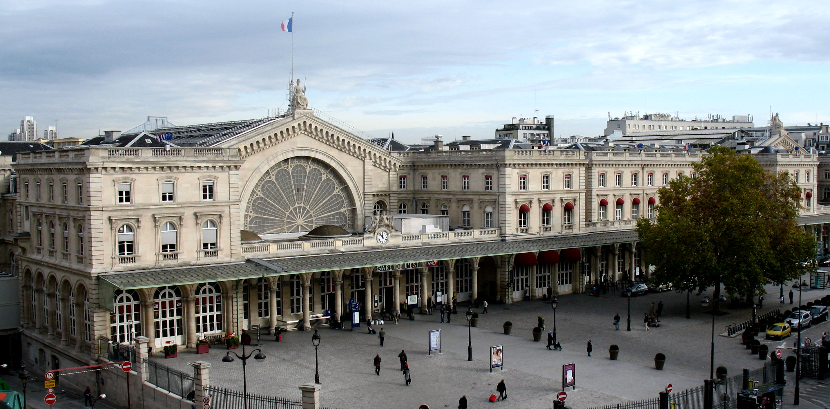 Gare de Paris-Est. La gare de l'Est est l'une des six grandes gares terminus du réseau de la SNCF à Paris. Elle se trouve dans le Xe arrondissement, près de la gare du Nord.